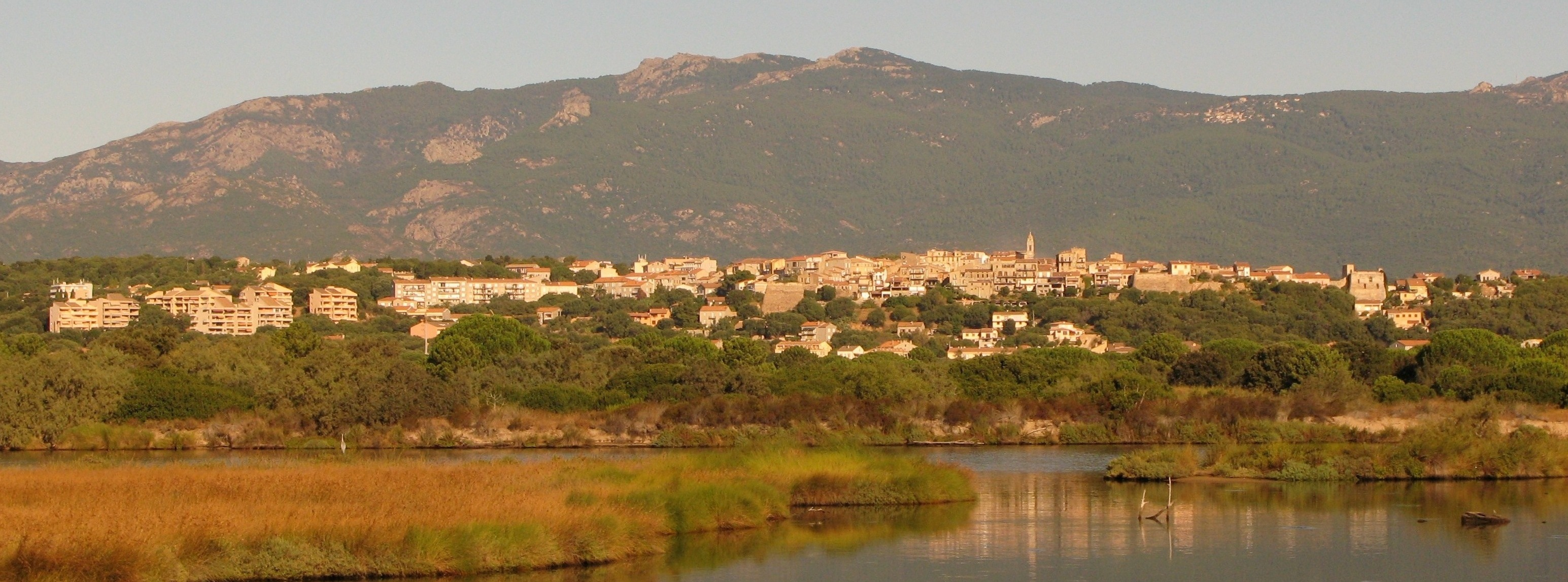 Vue op Porto-Vechio vun Osten. Porto